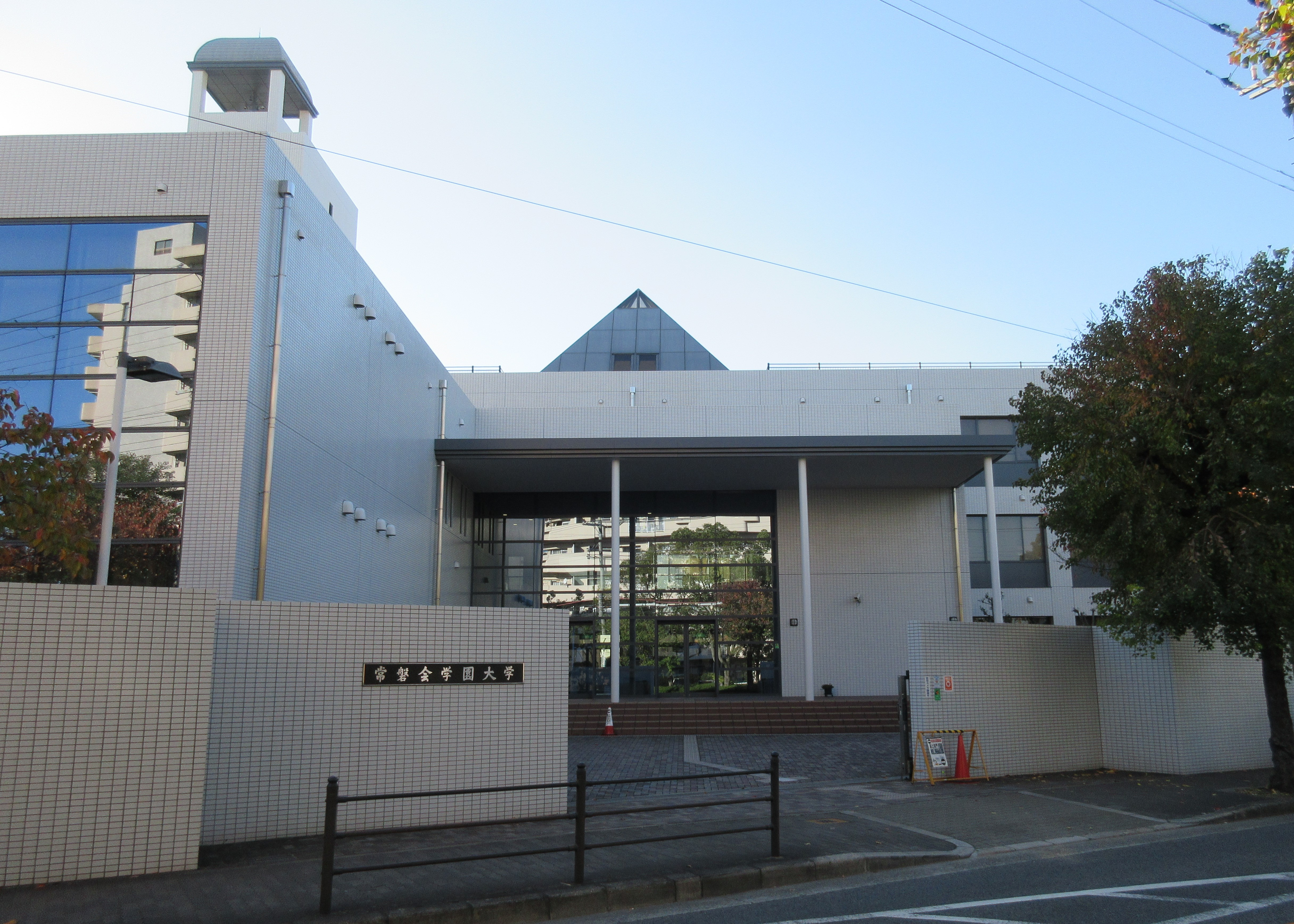 常磐会学園大学